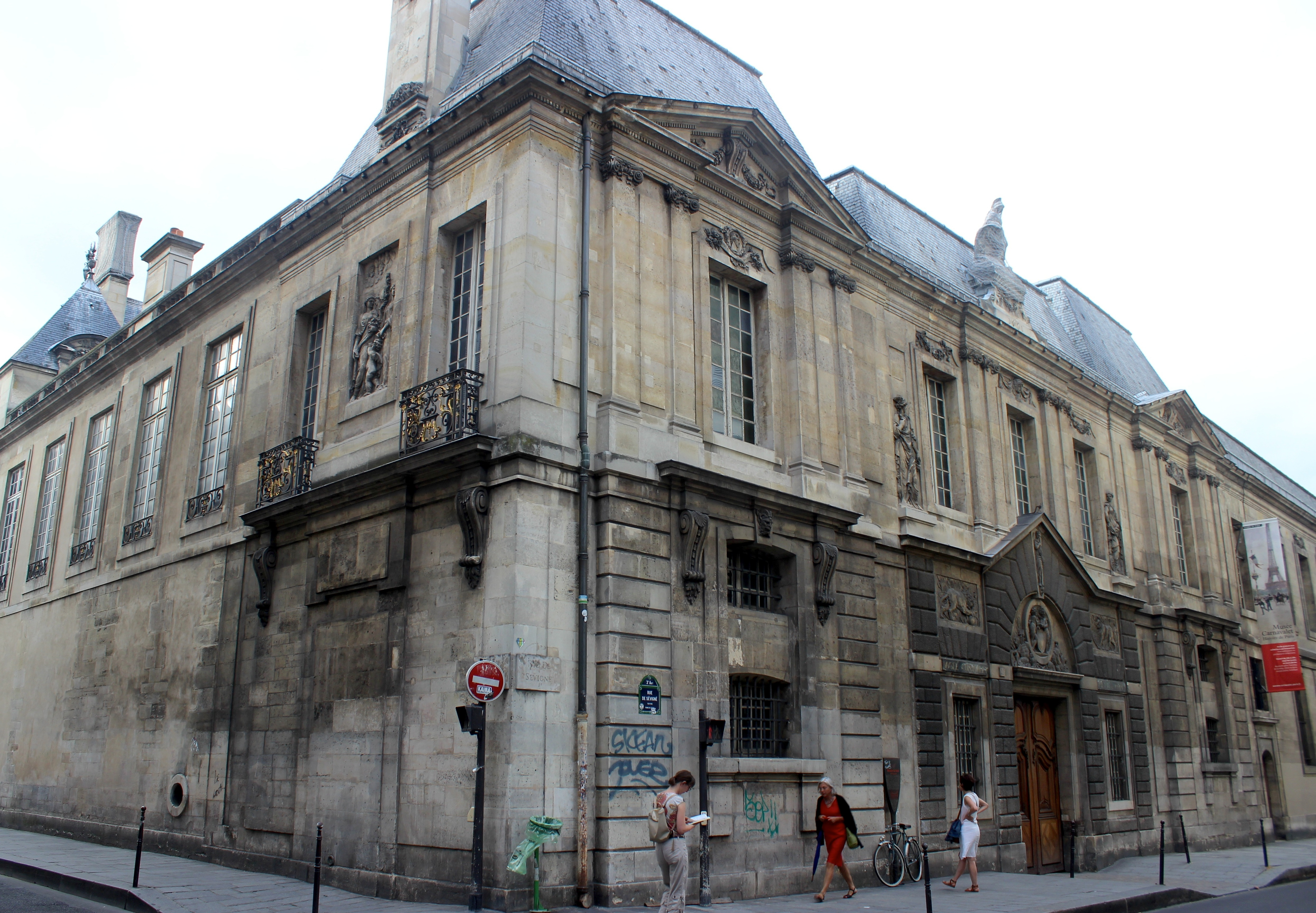 París. Musée Carnavalet, fachada.